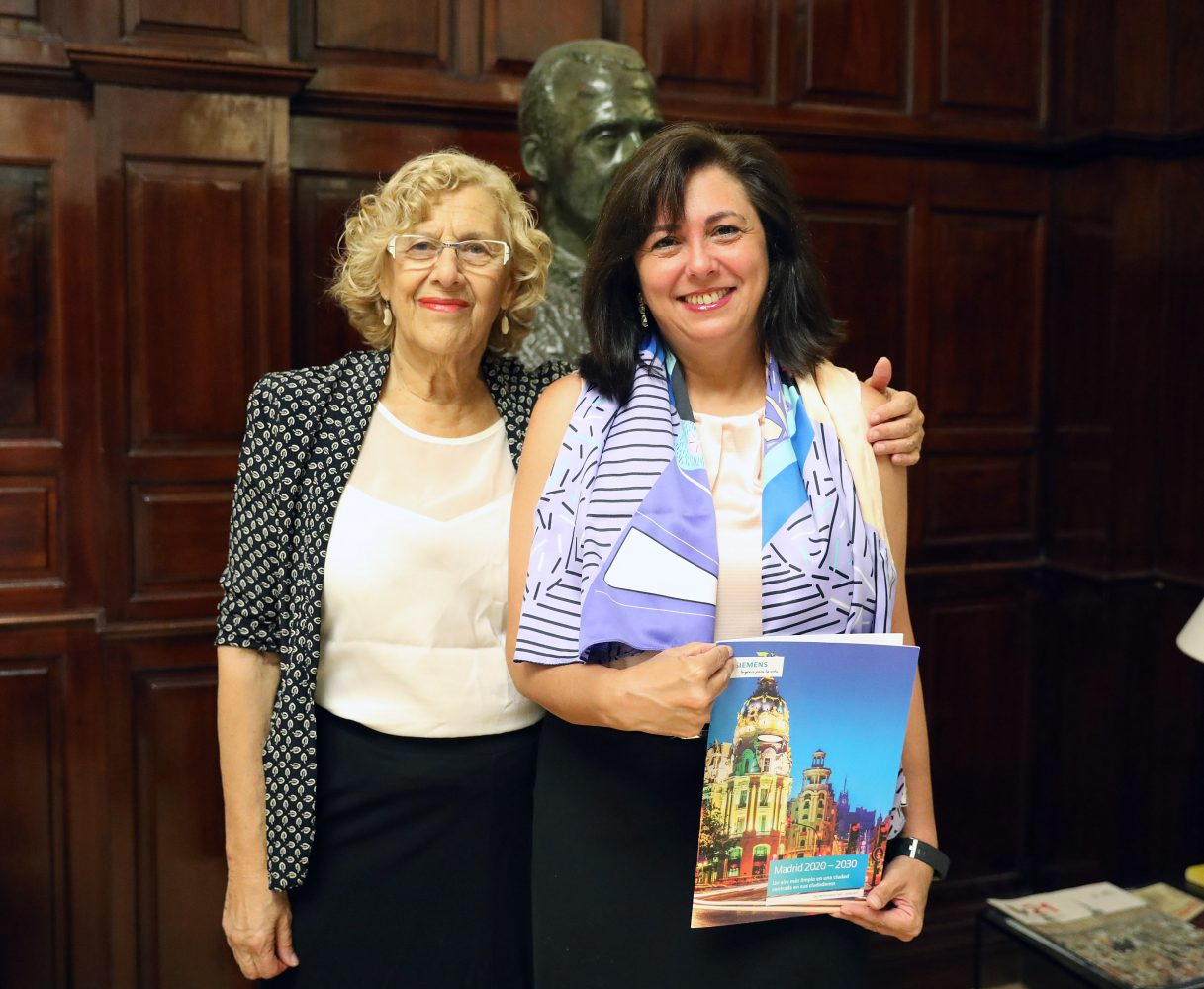 La alcaldesa de Madrid, Manuela Carmena, se ha reunido esta mañana en el palacio de Cibeles con la presidenta de Siemens España, Rosa García, y otros directivos de la empresa quienes le han presentado el resultado de un estudio, basado en más de 200 datos facilitados por el Ayuntamiento, encaminado a disminuir los gases contaminantes y mejorar la calidad del aire en la capital.